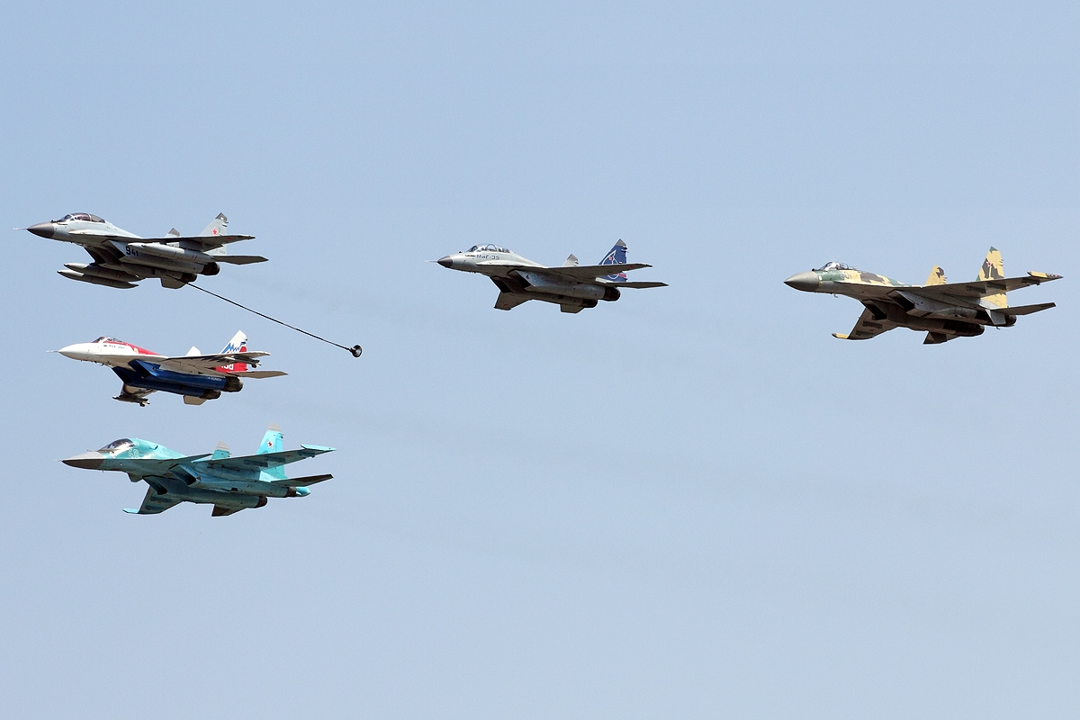 MAKS-2011: MiG-29K, MiG-35D, MiG-29OVT, Su-35BM, Su-32FN (Su-344)